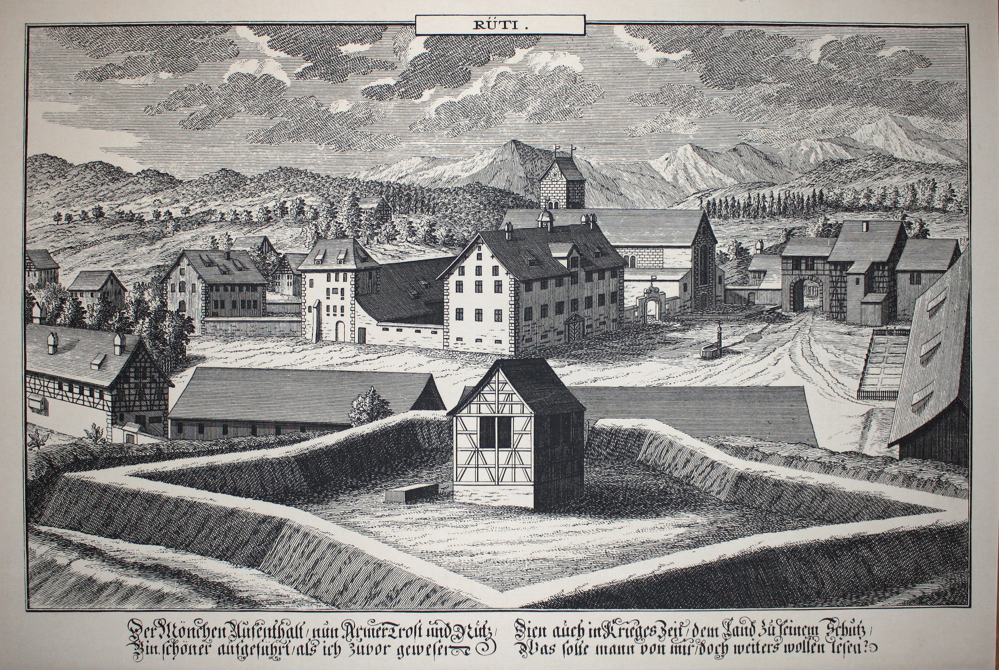 Rüti (ZH) : Kloster Rüti, Zeichnung eines noch zu identfizierenden Autors, Zustand nach dem Brand des Amthauses.